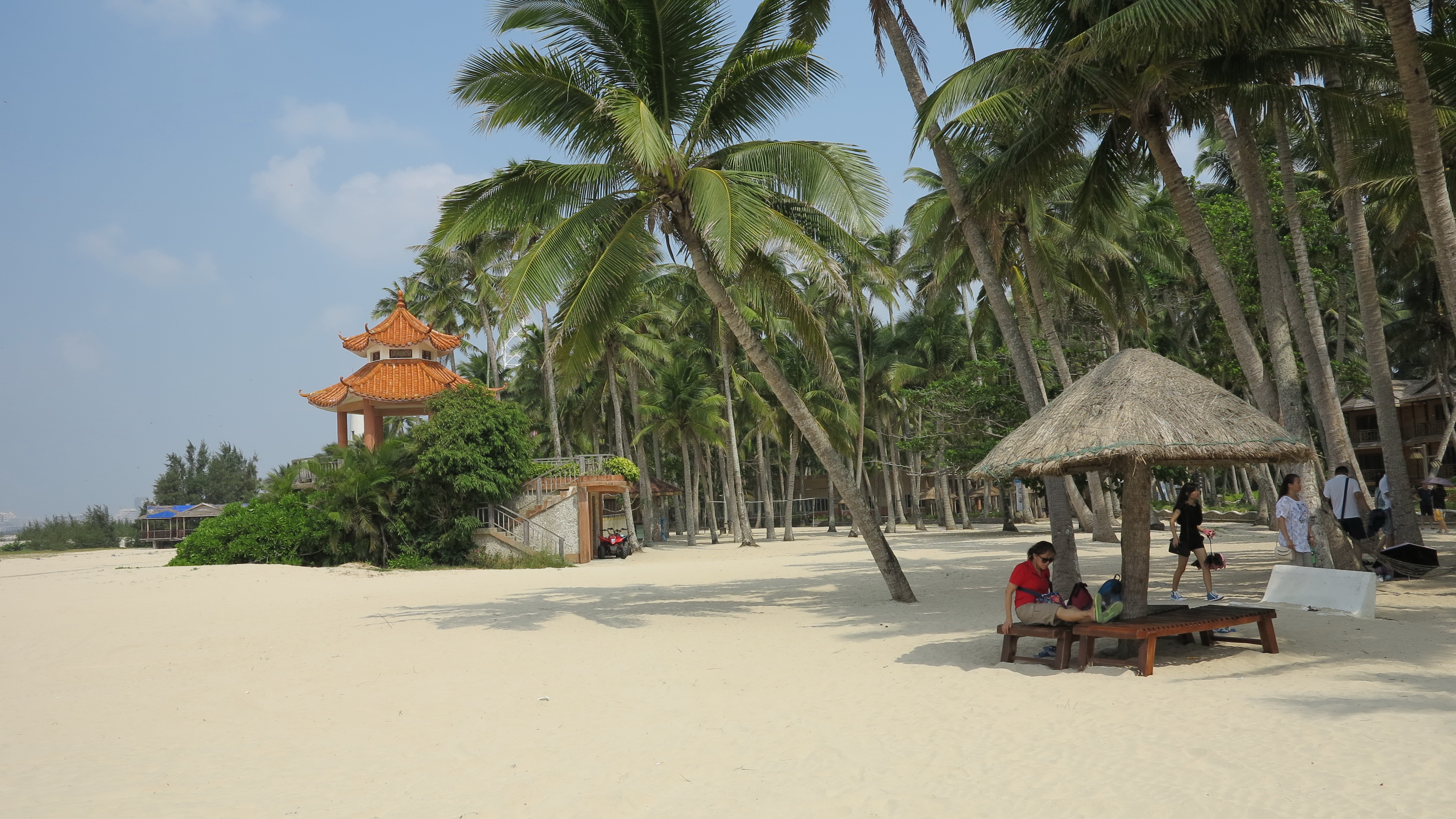 海南 文昌市椰林湾